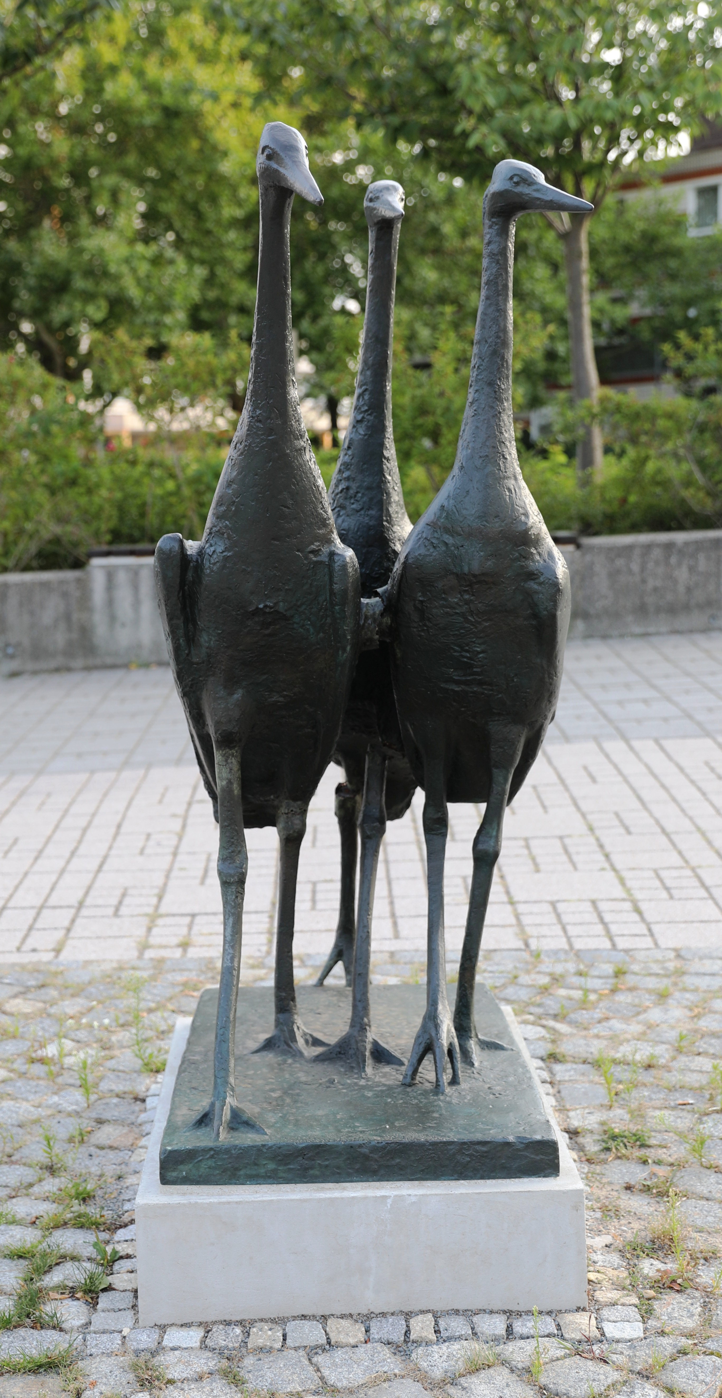 "Kranichgruppe" von Peter Fritzsche (1968), Hansaplatz. Am 22. August 2019 wegen Beschädigungen demontiert